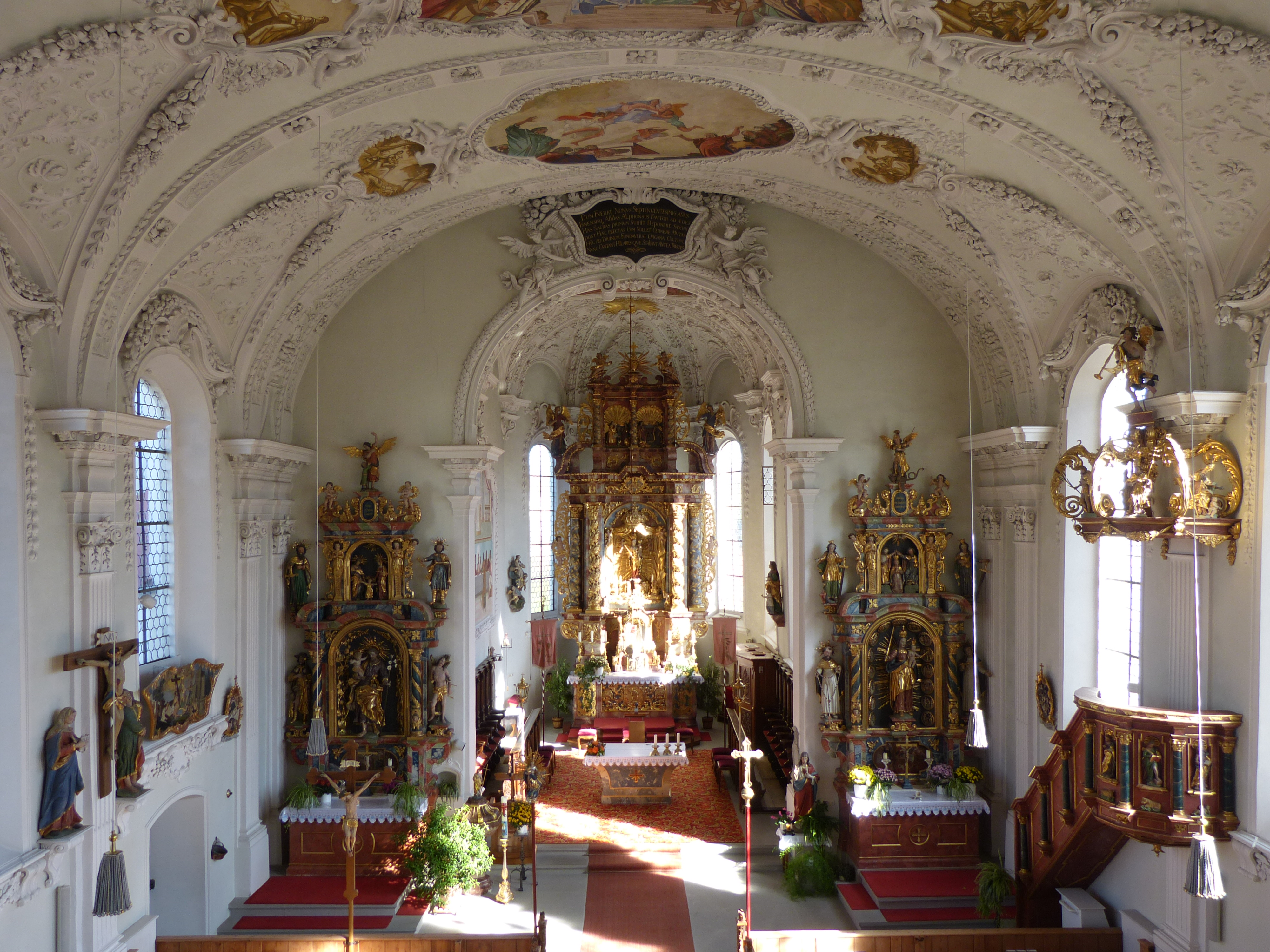 Mariä Himmelfahrt (Frauenzell)